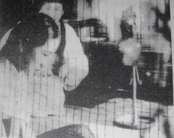 中文（中国大陆）: 韩国首部有声电影《春香传》